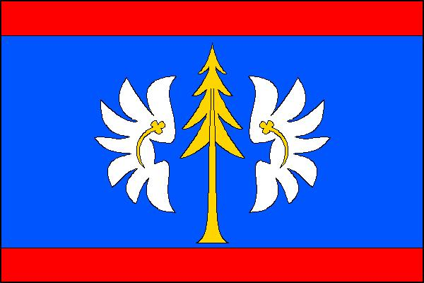 Vlajka obce Druhanov